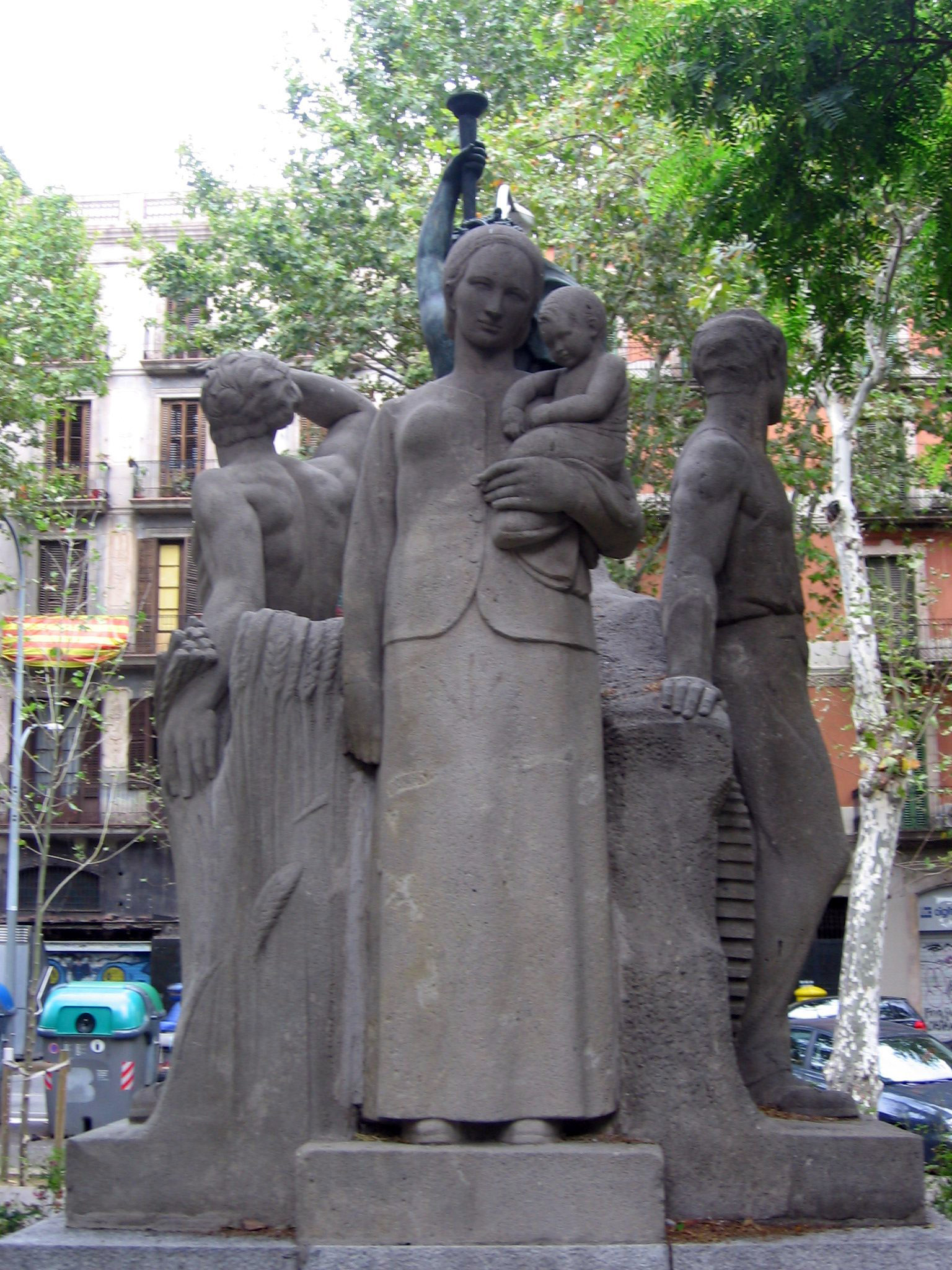 A Francesc Layret (Frederic Marès).